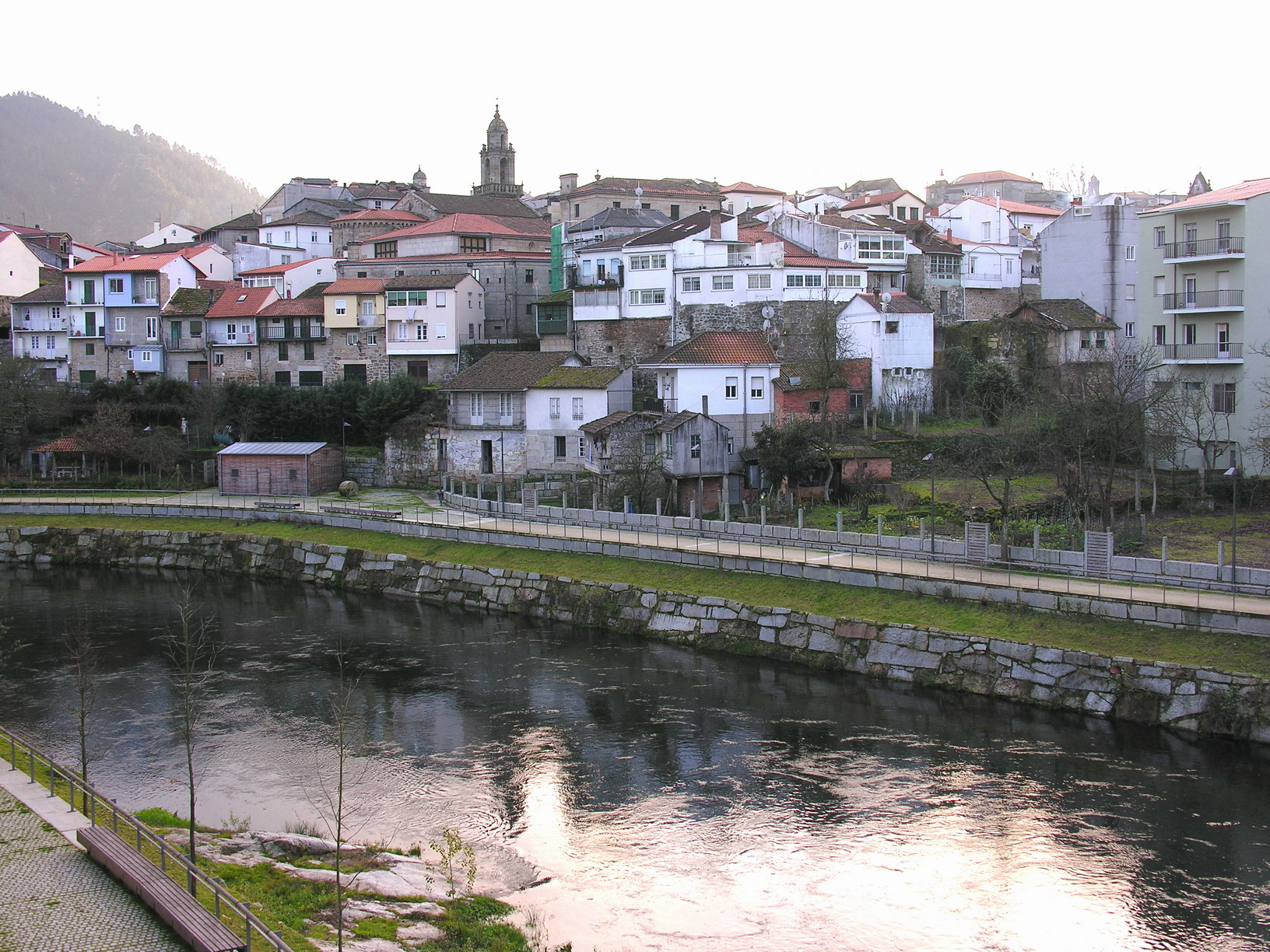 self made. Arnoia - Ribadavia - Ourense - Galicia - Spain